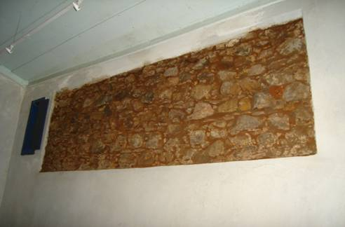 aspecto interno da parede da capela depois da restauração